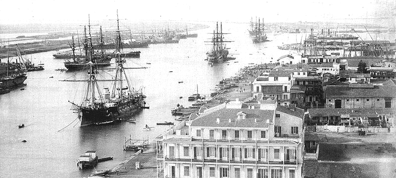 Auf die Passage des Sueskanals wartende Schiffe um 1880.